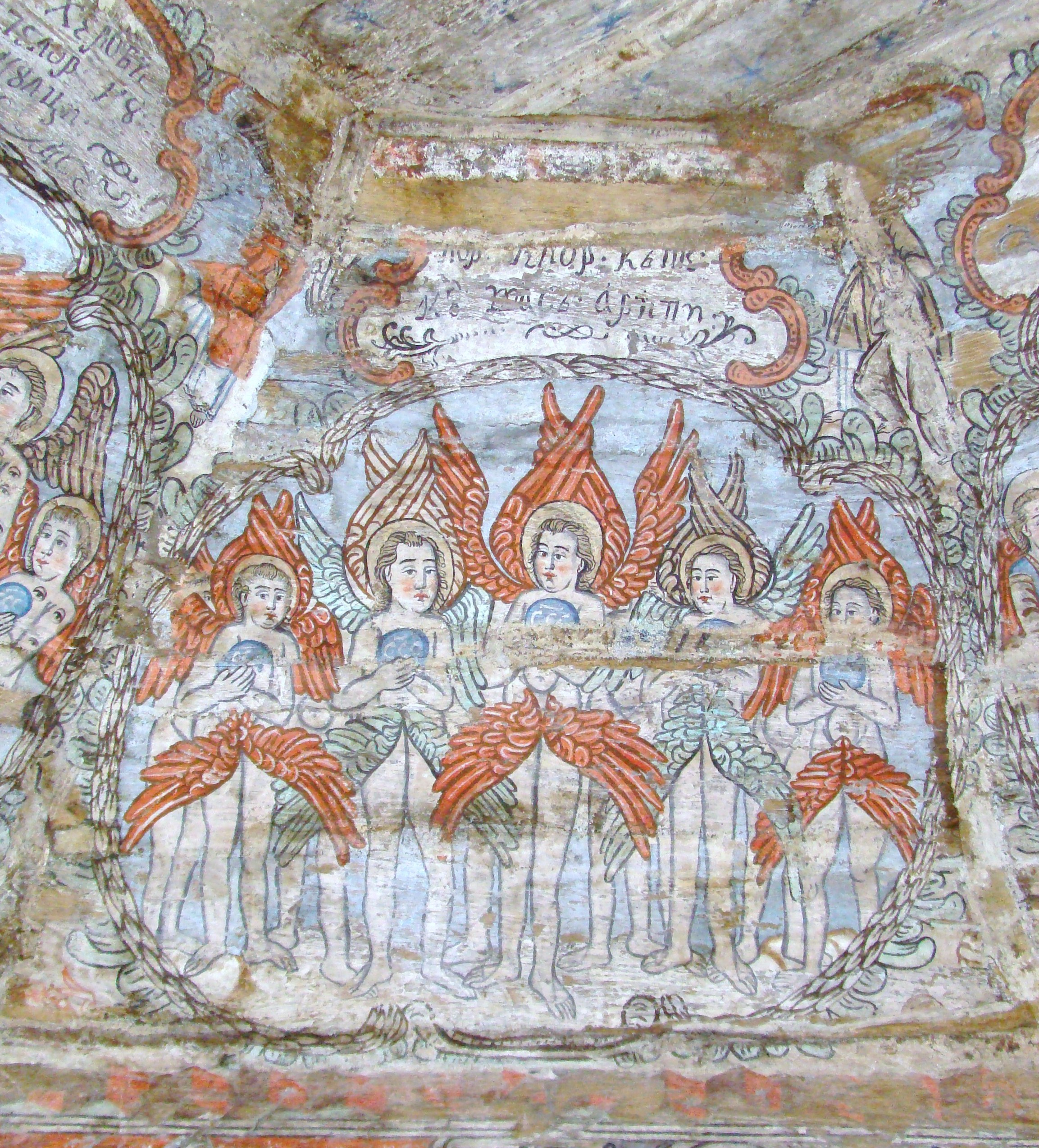 Biserica de lemn "Intrarea Maicii Domnului în Biserică" , sat BÂRSANA